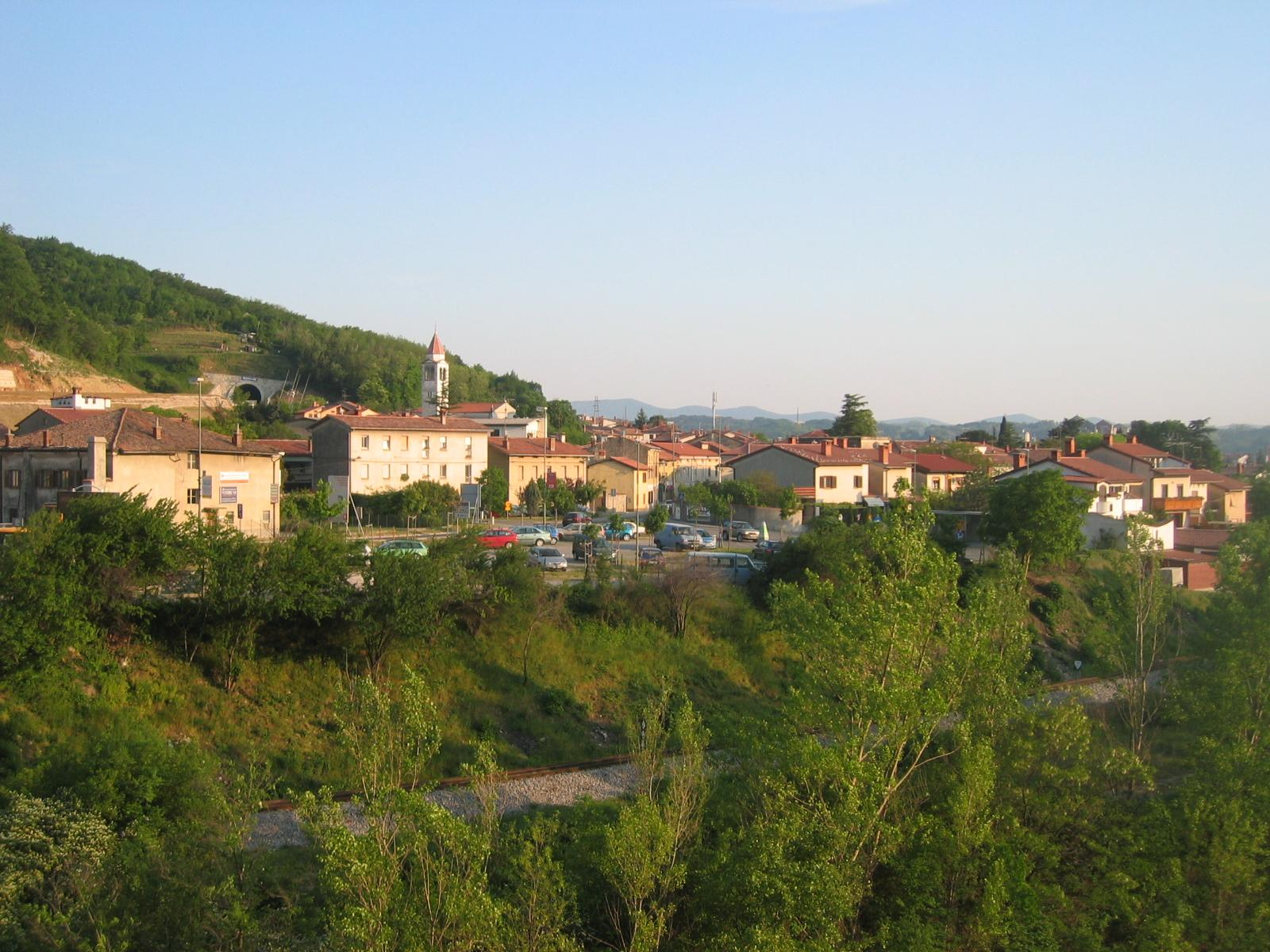 Solkan, town in Slovenia